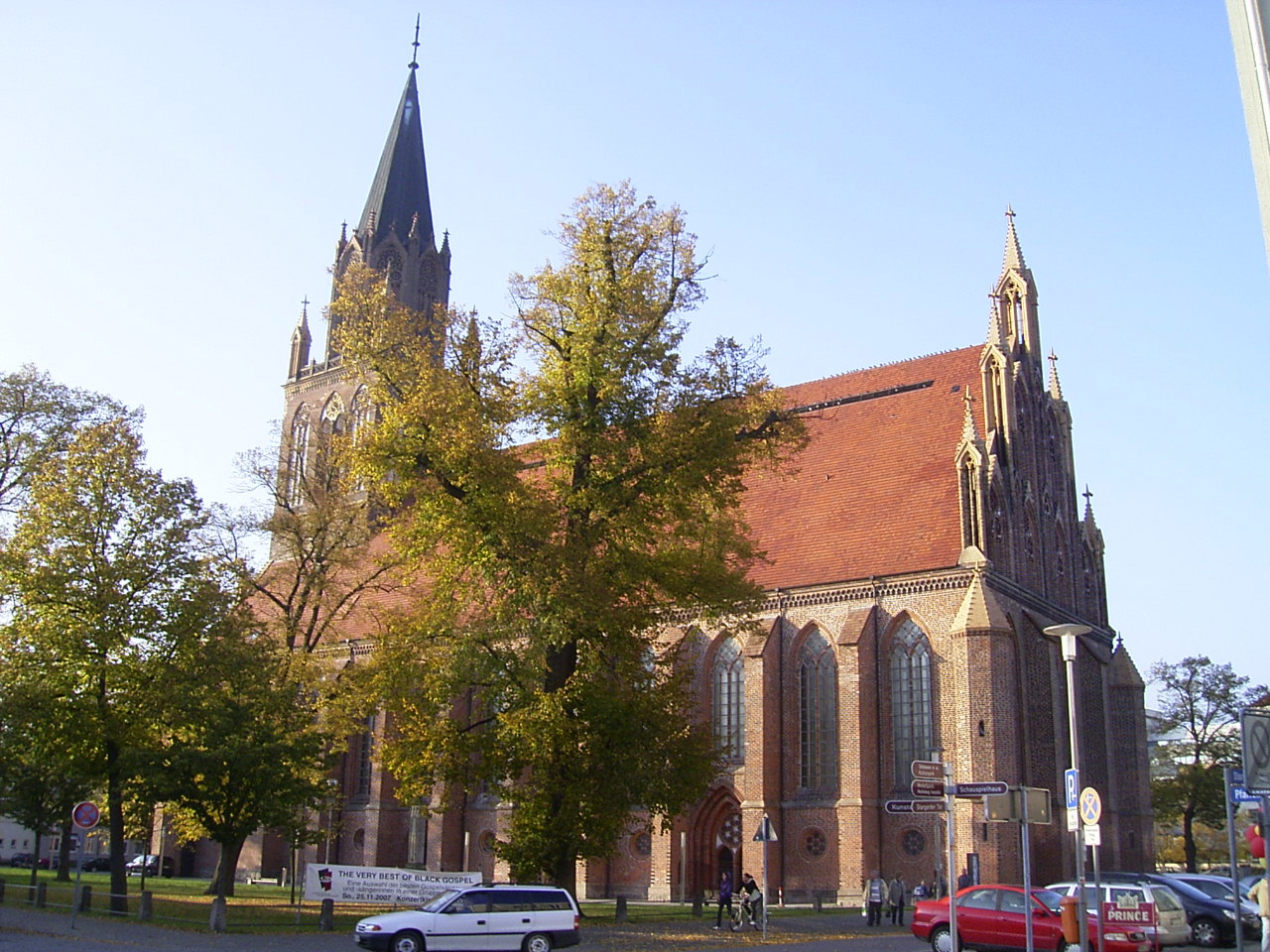 Die evangelisch-lutherische Marienkirche in Neubrandenburg dient heute nicht mehr als Gotteshaus sondern wird als Konzerthalle genutzt.